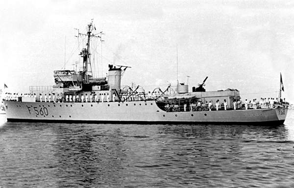 La Corvetta Alabarda con equipaggio schierato per il saluto alla voce. La foto risale a dopo i lavori del 1956, in cui venne sbarcato il cannone prodiero e la tuga allungata verso prora, per renderla idonea a svolgere la sede di nave comando di Divisione